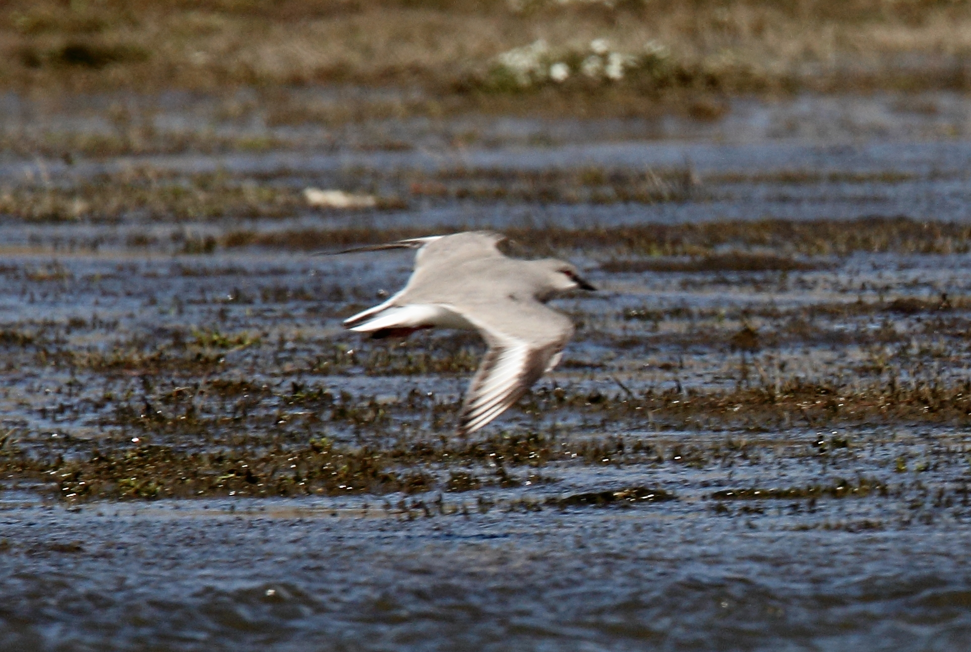 Magellanic plover (Pluvianellus socialis)